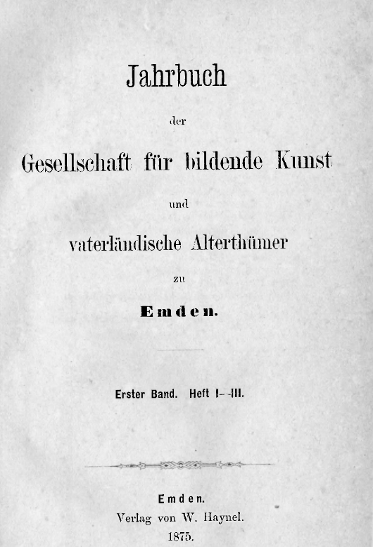 Erstausgabe des „Jahrbuch der Gesellschaft für bildende Kunst und vaterländische Alterthümer zu Emden“ aus dem Jahre 1872